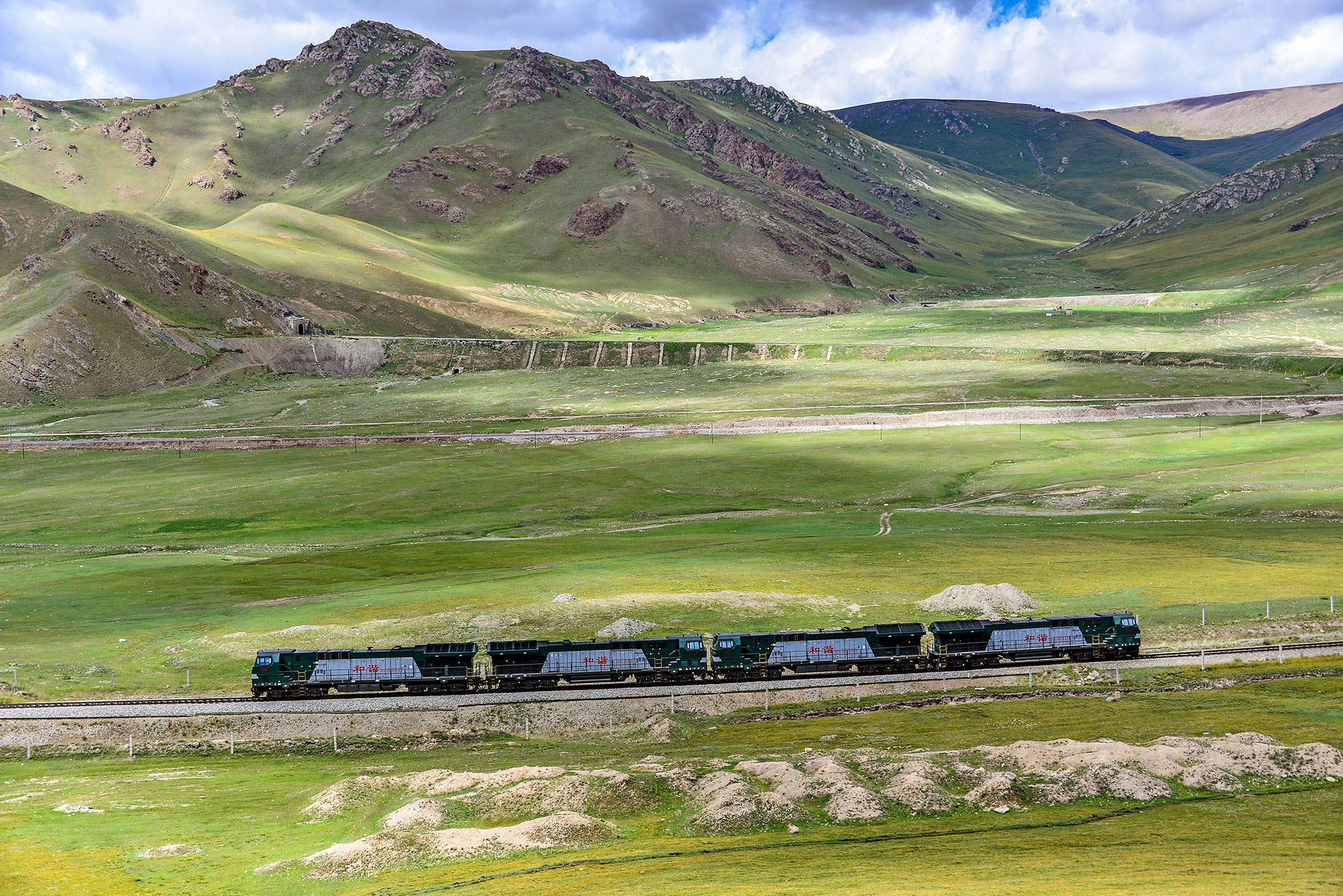 photo by Xundaogong 巡道工出品